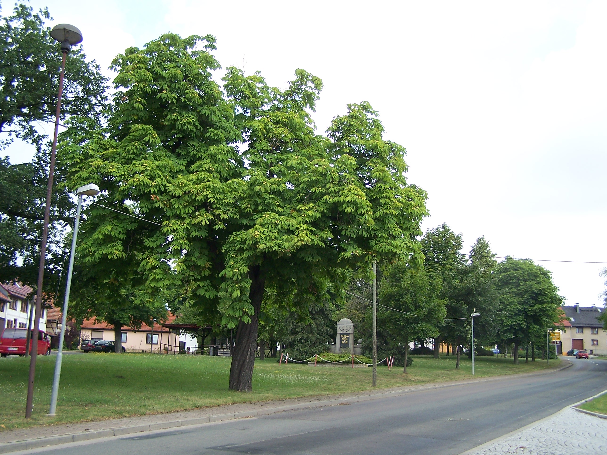 Teutleben